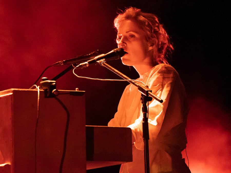 The Danish singer, songwriter and musician Agnes Obel at Sentrum Scene in Oslo (2020).